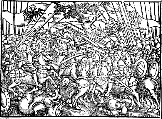 Bitwa na Psim Polu / Battle at Hundesfeld 1109